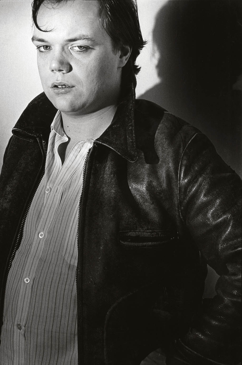 Patrick Nebel, zanger en oprichter Belgische band 'Nacht und Nebel'.